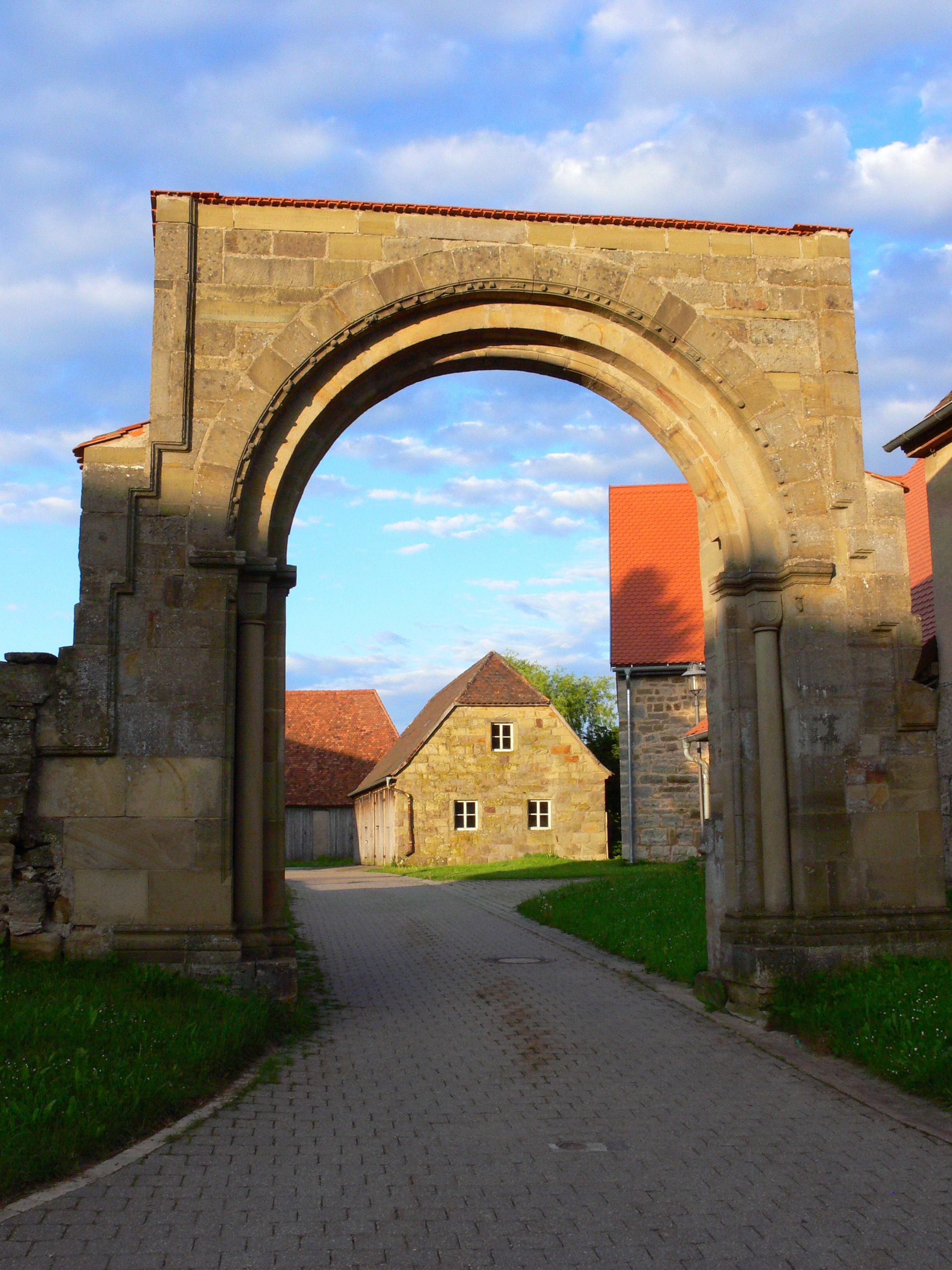 Torbogen der ehemaligen Johanniterkommende